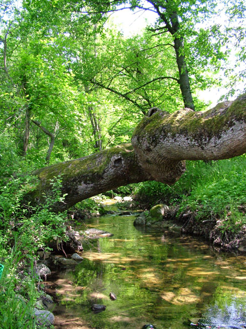 река Сребра край вилна зона Дондуково